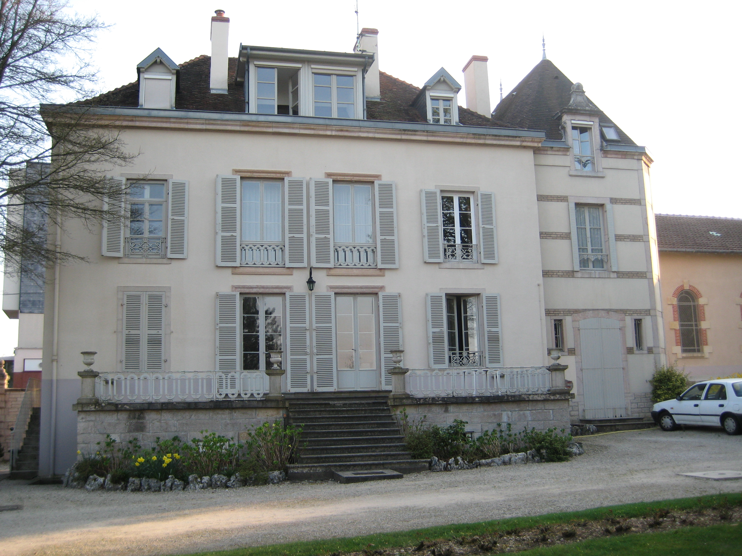 Maison de la Fraternité franciscaine de Jésus-Prêtre à Brochon en Côte d'Or (France) Achetée et transformée par Sr Claire